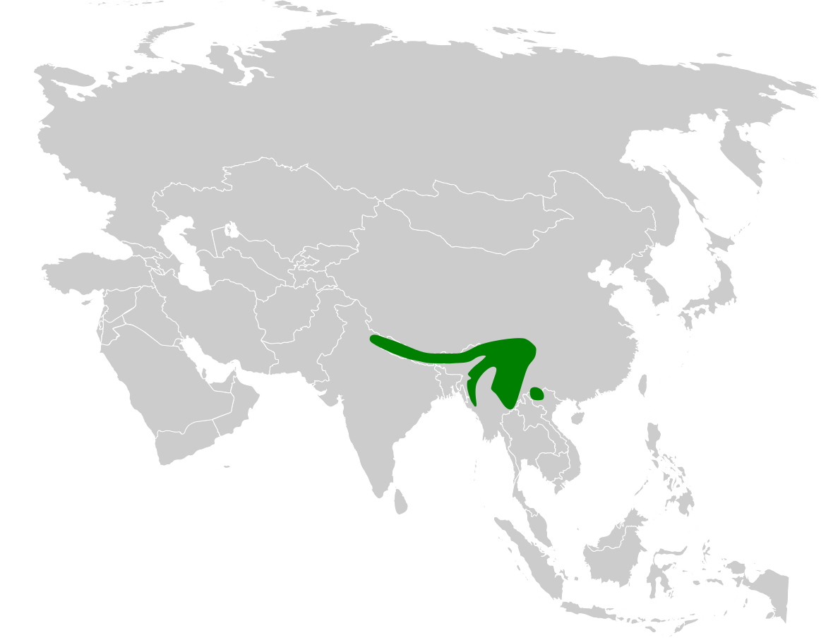 Abroscopus schisticeps distribution map, based on